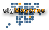 Logo del Servidor Cartográfico de los recursos sociales, Sigmayores